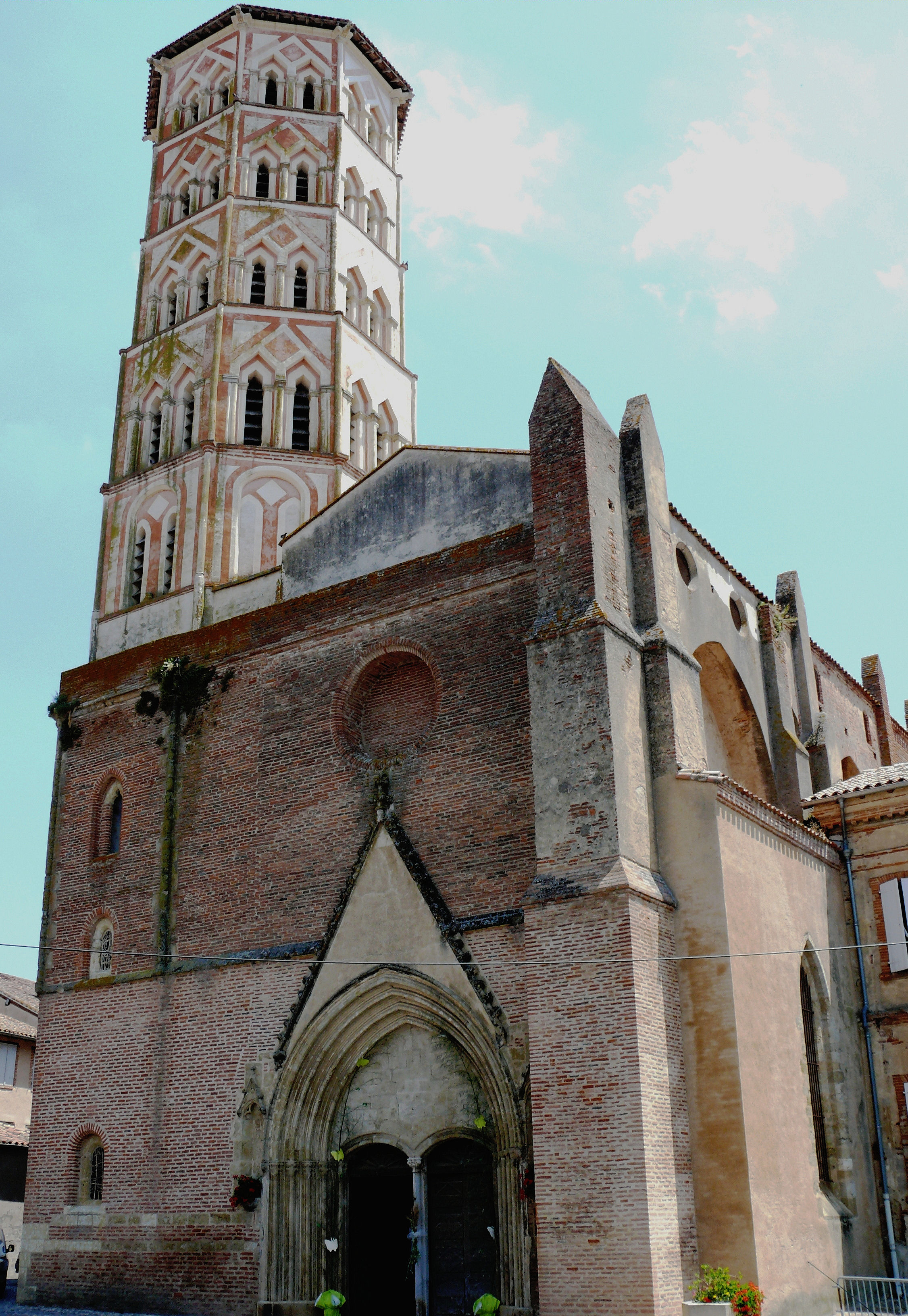 Cathédrale Sainte Marie de Lombez - Façade et clocher